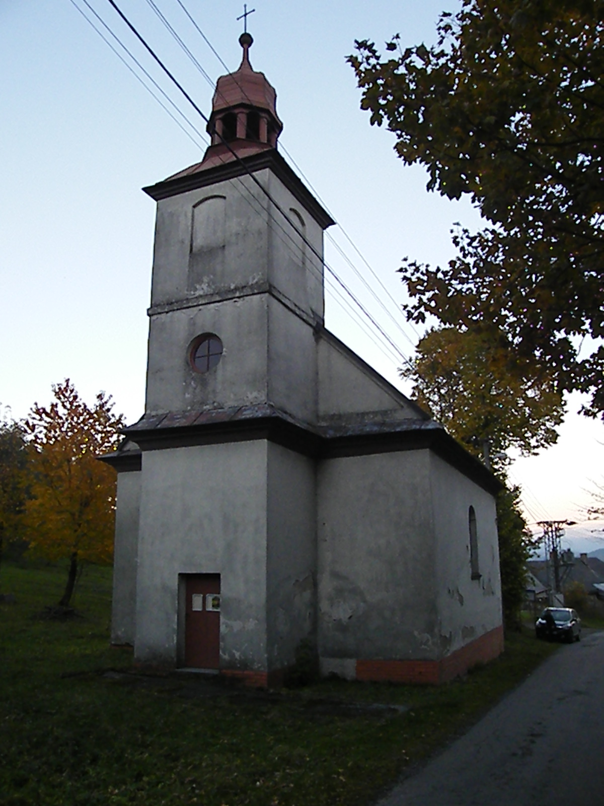 Kostel sv. Anežky České (Stříbrnice)